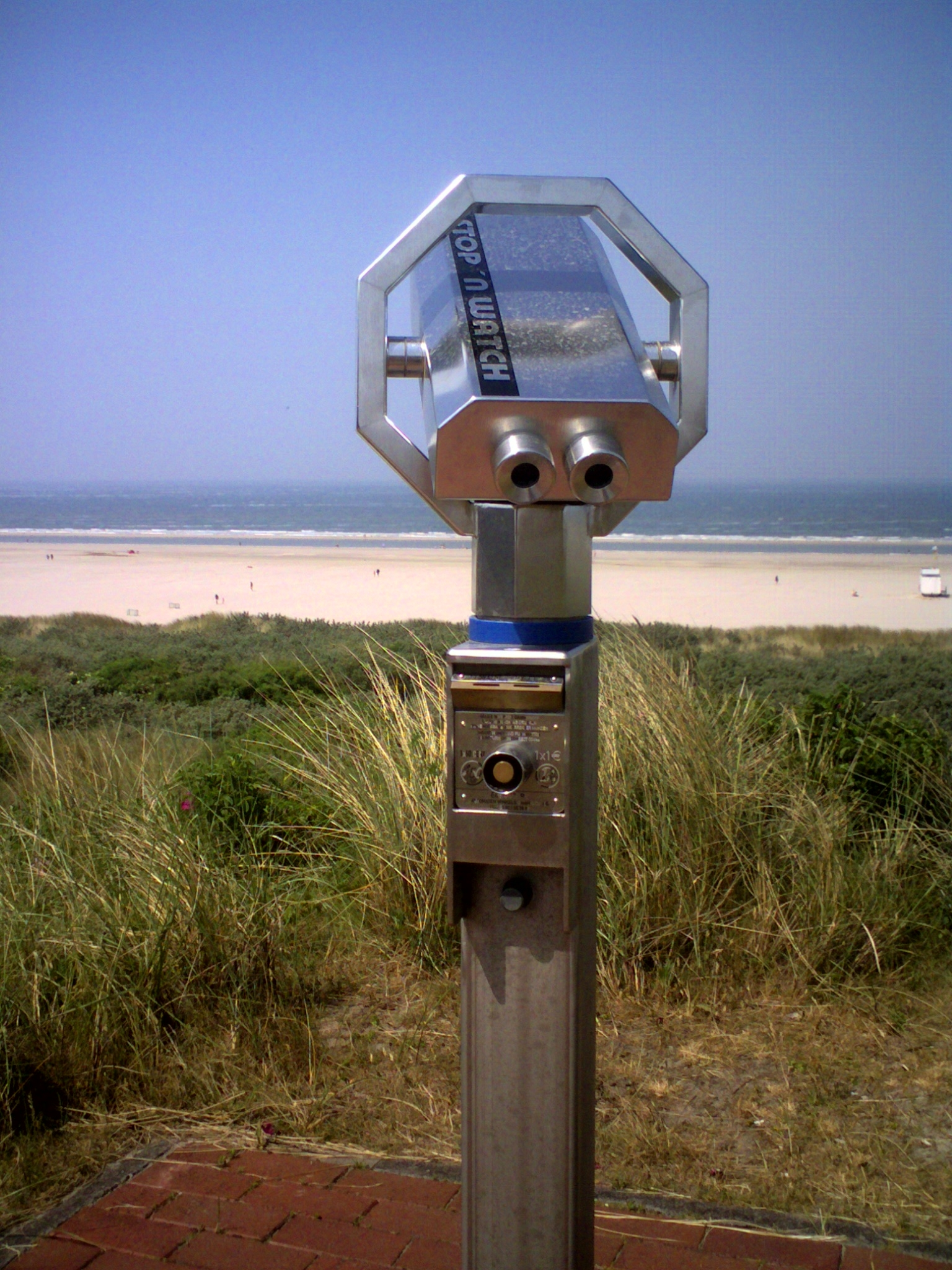 Münz-Fernrohr auf der Hauptdüne am alten Wasserturm (ostfriesische Nordseeinsel Juist)